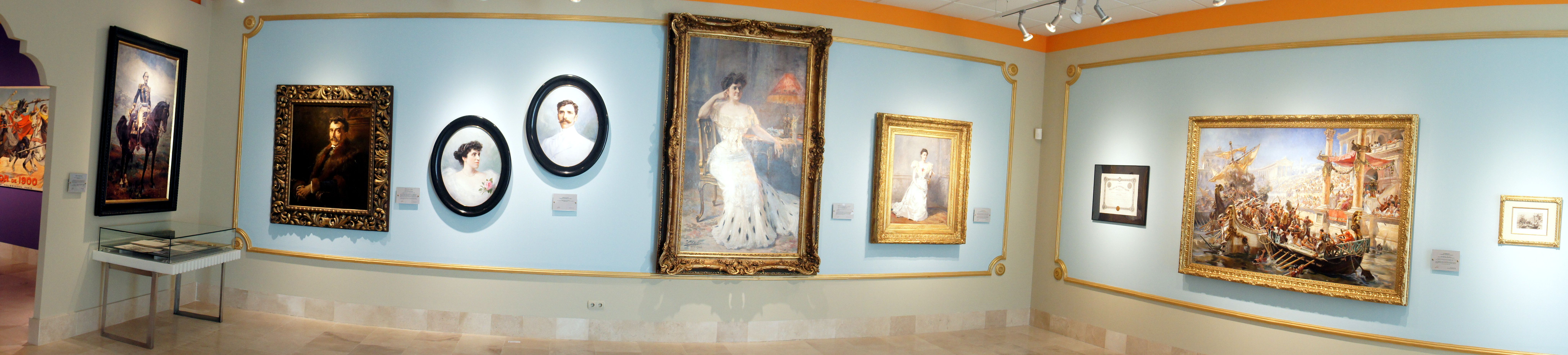 Sala nº 3. América. Museo Ylpiano Checa, Comunidad de Madrid, España